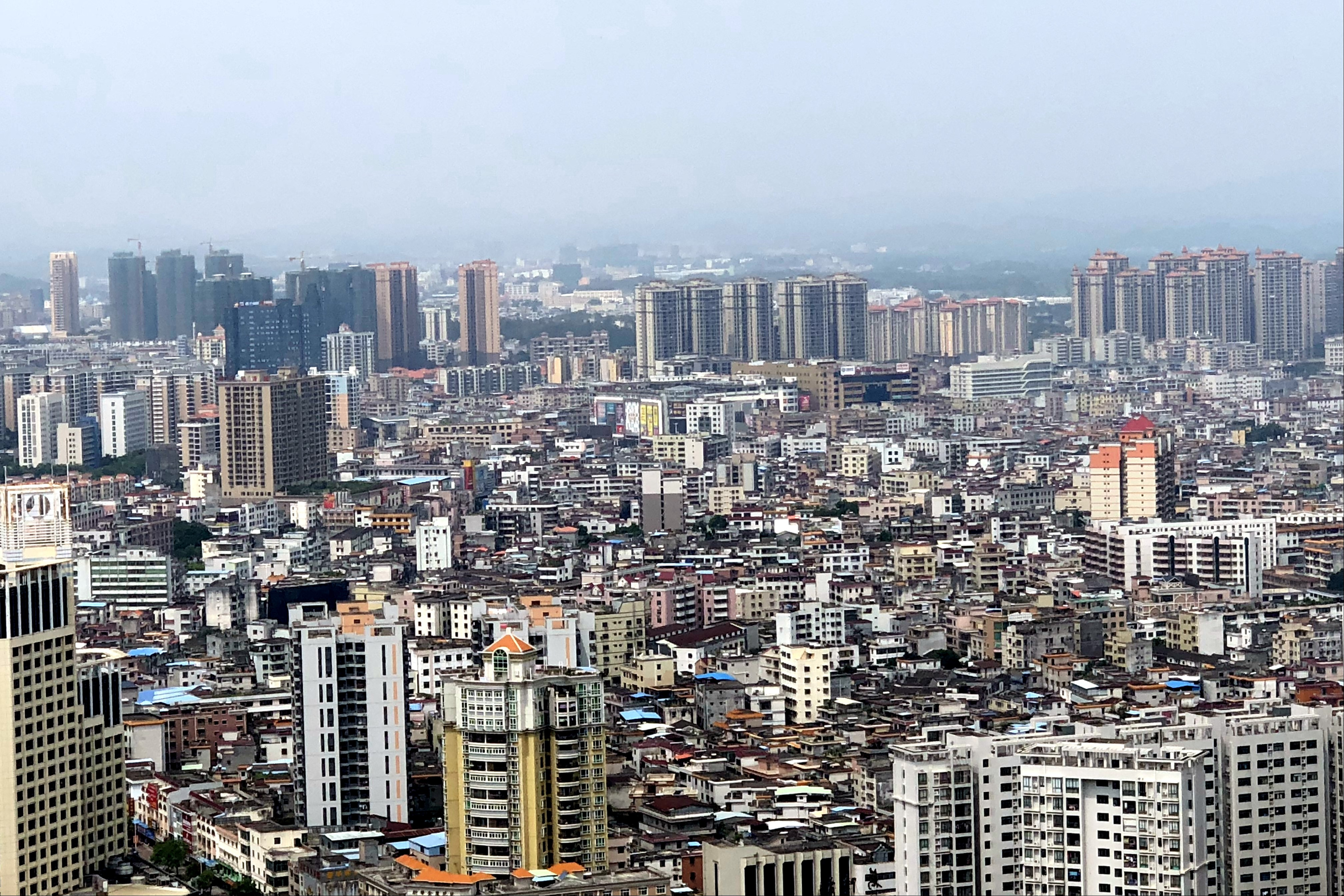 中文（中国大陆）: 飞鹅岭眺望惠东县城